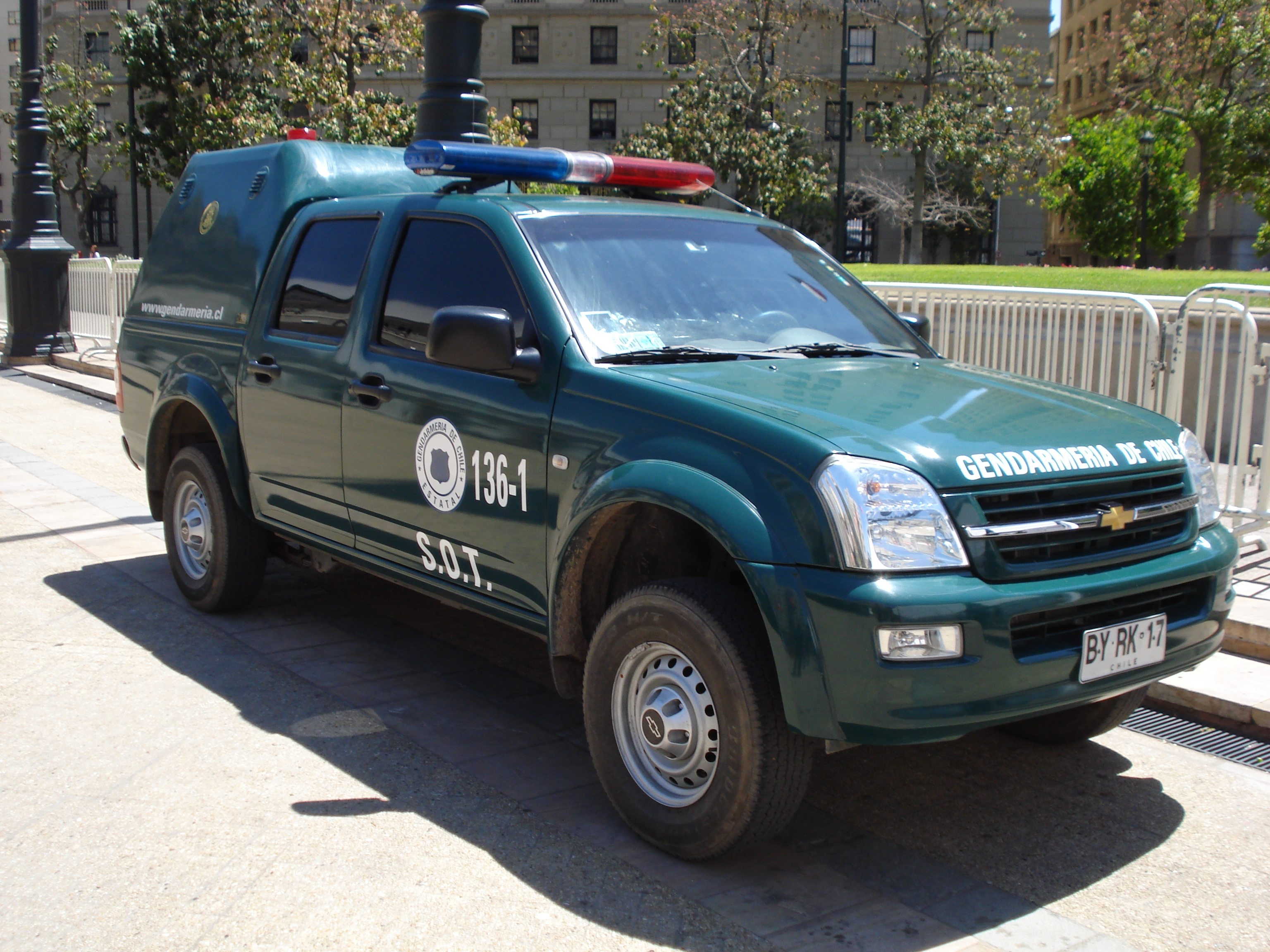 Camioneta de Gendarmería de Chile. Santiago de Chile